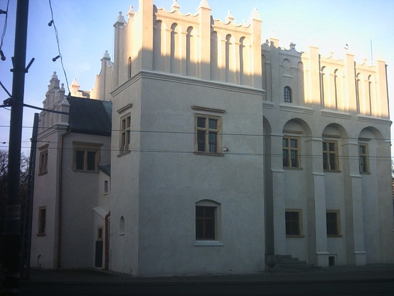 Zamek w Pabianicach